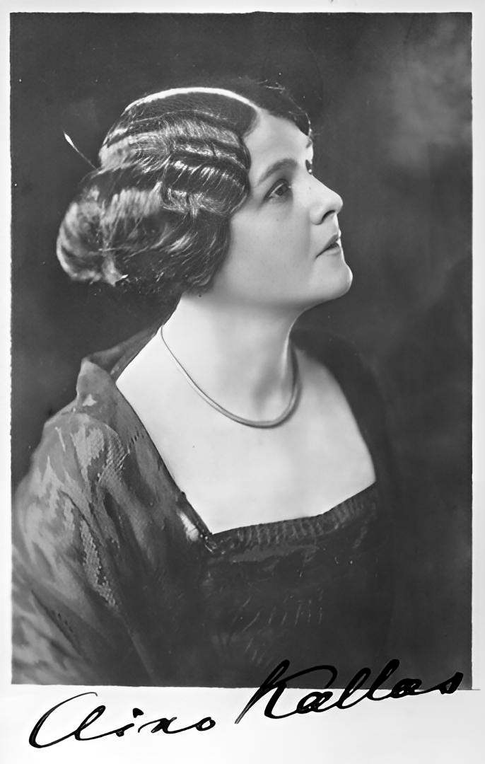 Aino Kallas, suomalainen kirjailija.